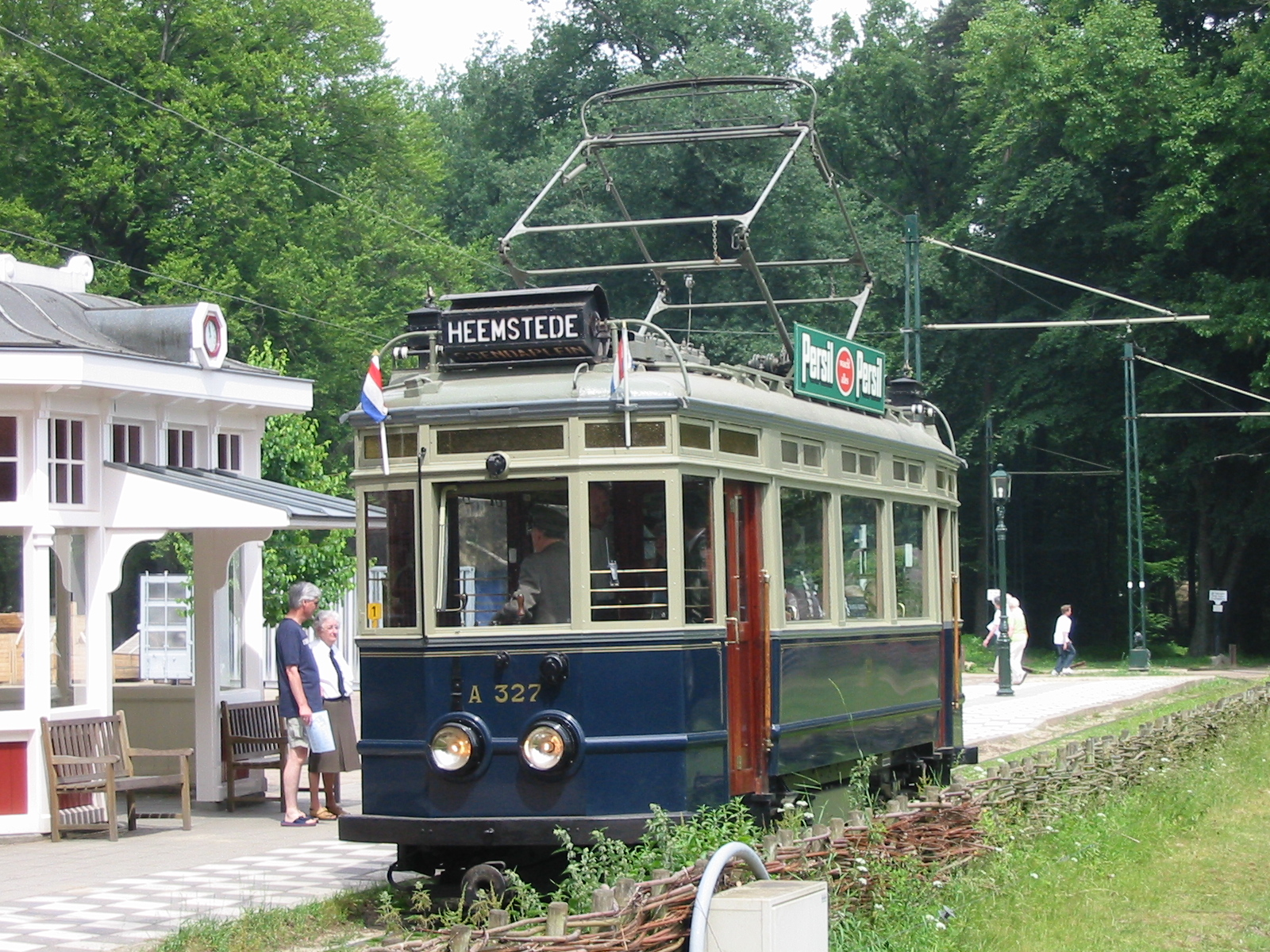 Motorrijtuig A327 van de NZH op zondag 18 juni 2006 te gast in het Openluchtmuseum te Arnhem.